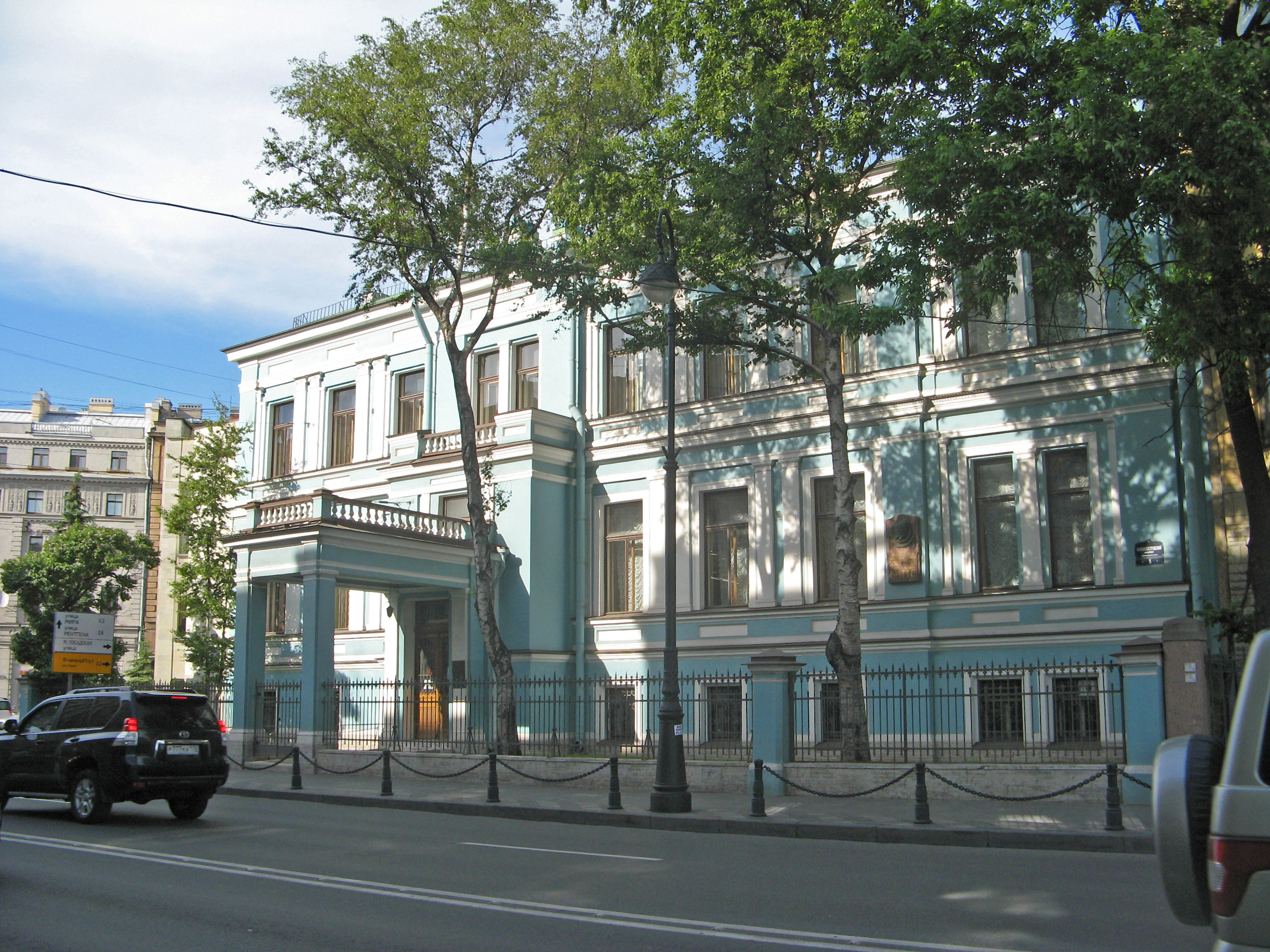 Особняк Витте С.Ю.: Каменноостровский проспект, 5, литер Б, Петроградский район, Санкт-Петербург